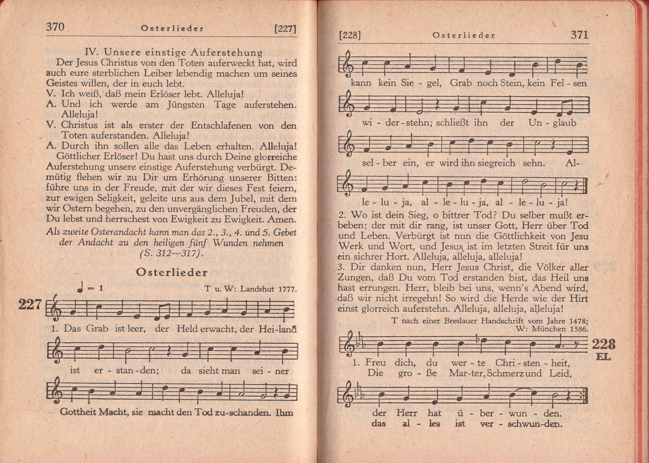 Das Grab ist leer, der Held erwacht, Version Erzbistum Paderborn